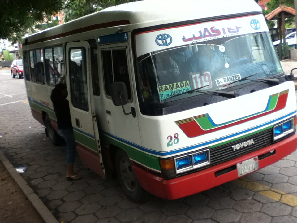 Transporte público "masivo" de Santa Cruz de Sierra.